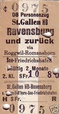 Internationale Fahrkarte der Bodensee—Toggenburg-Bahn, des SBB-Schiffsbetriebs und der Deutschen Bundesbahn von St. Gallen nach Ravensburg über Roggwil – Romanshorn See – Friedrichshafen, 2. Klasse, 1962